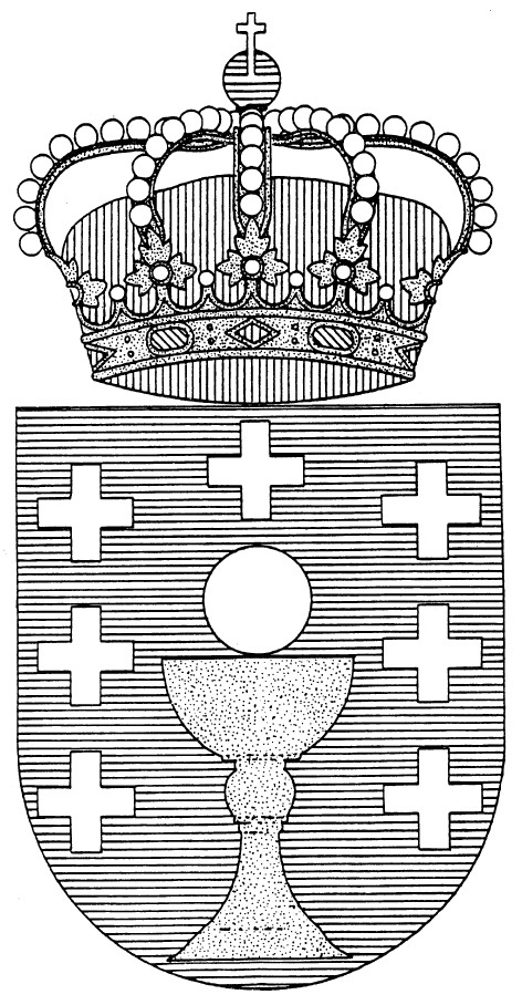 Escudo de Galicia. Lei 5/1984, do 29 de maio, de símbolos de Galicia.